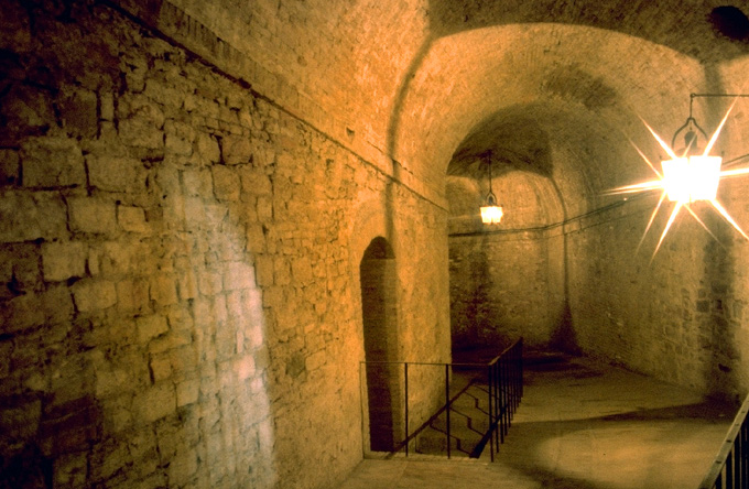 Perugia (Italy) - La Rocca Paolina